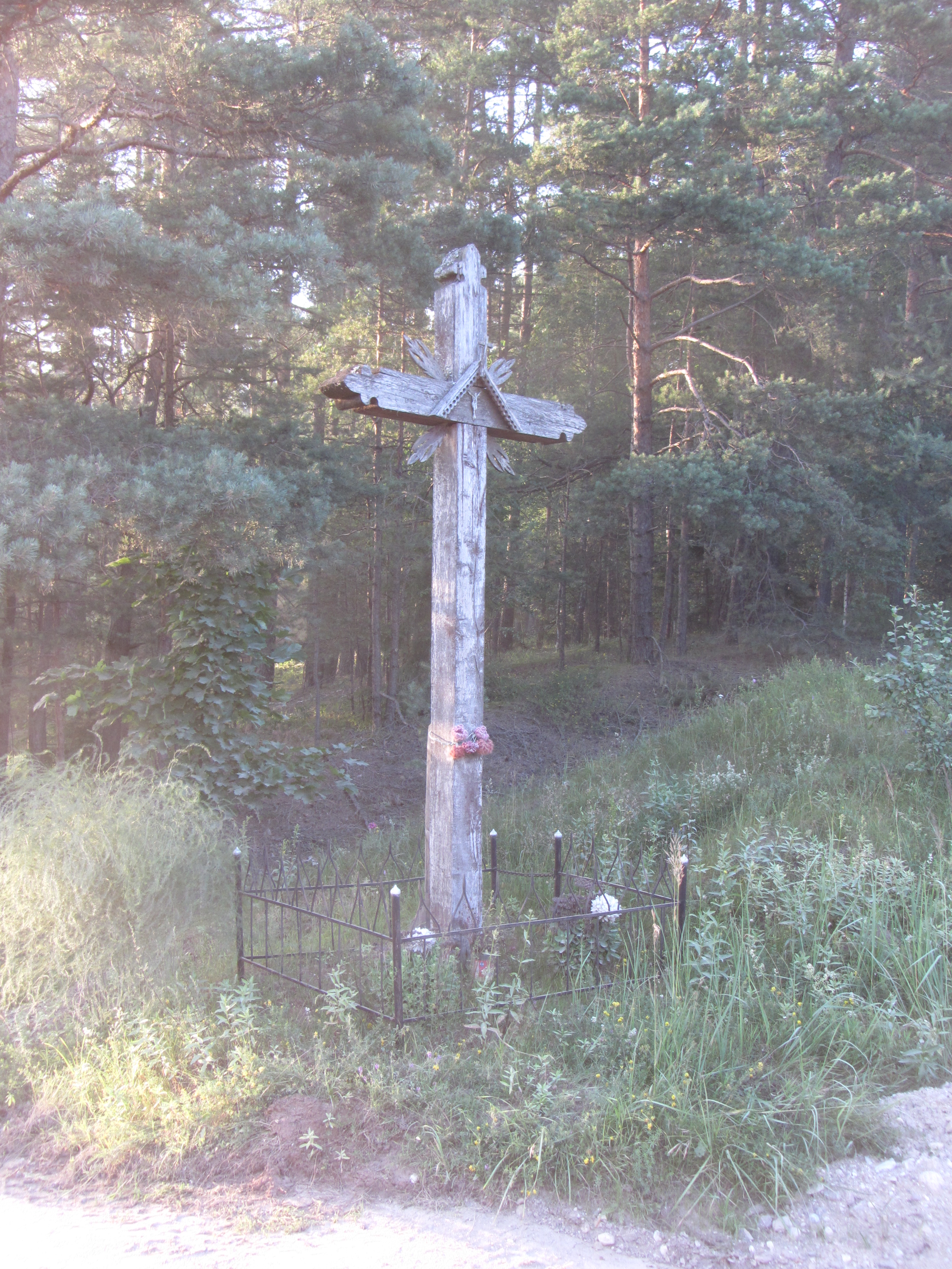 Zarasų sen., Lithuania